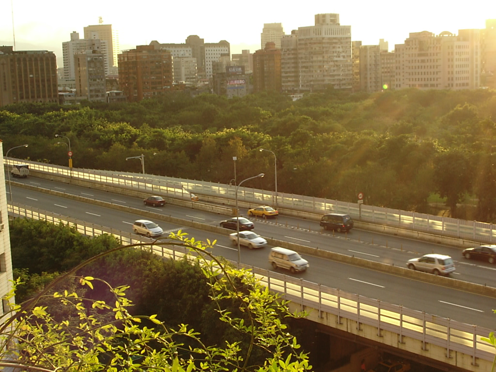 俯瞰臺北市建國高架橋與大安森林公園。